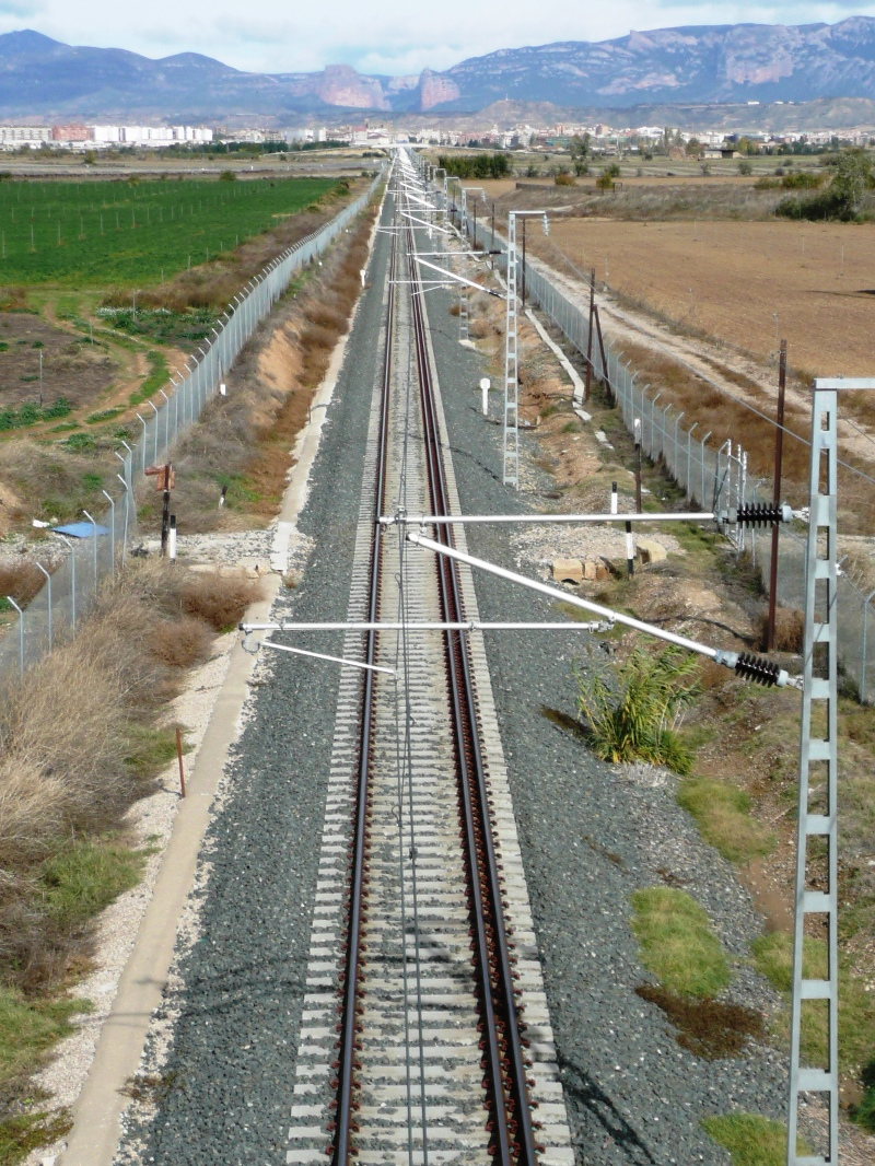 De "MZC" en Ferropedia publicado bajo los términos de "CC-BY-SA-3.0".